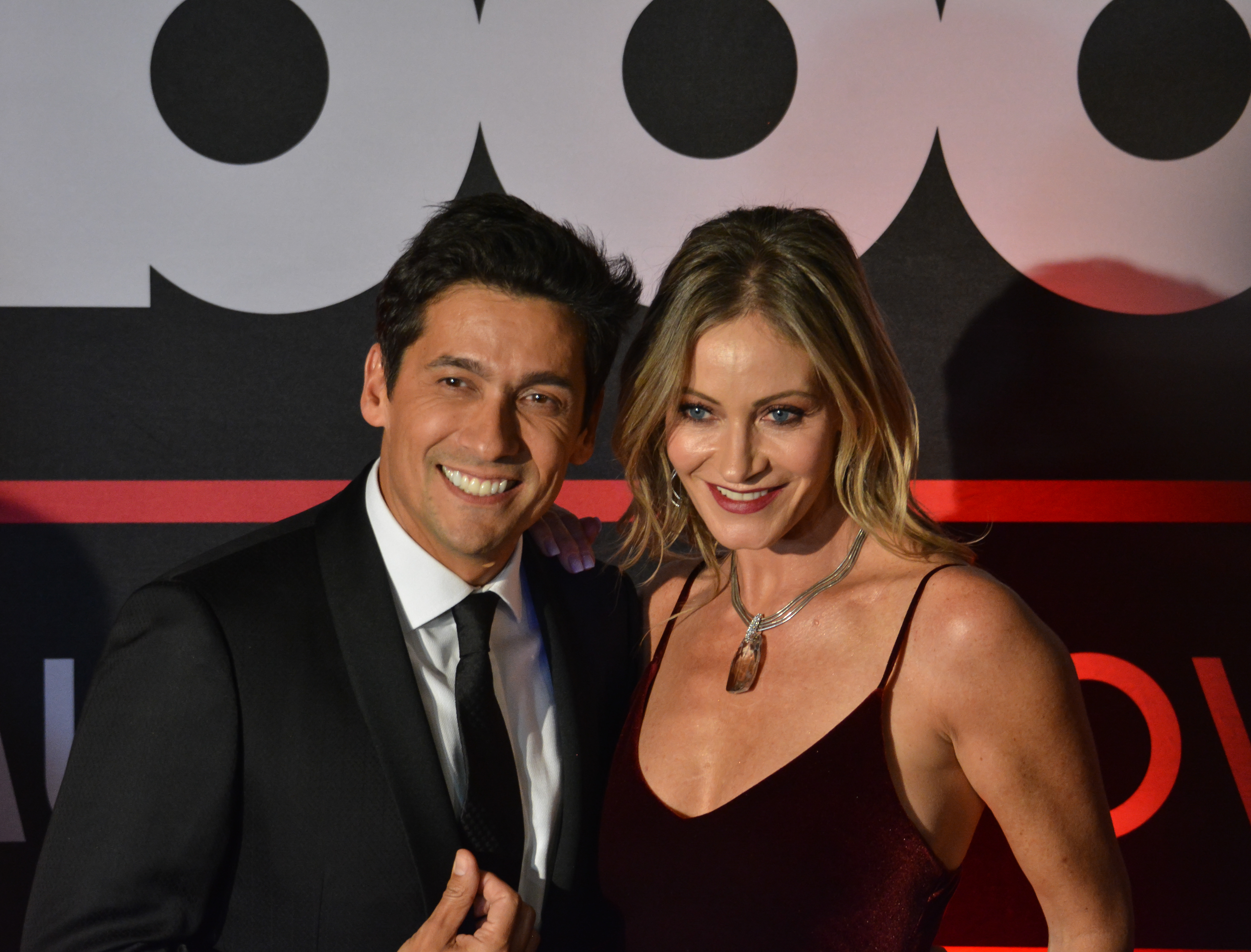 Gala Billboard Latin Music Showcase Chile 2018, Hotel Santiago, Santiago, Chile